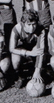 Raúl Castronovo, futbolista de Rosario Central en 1969.